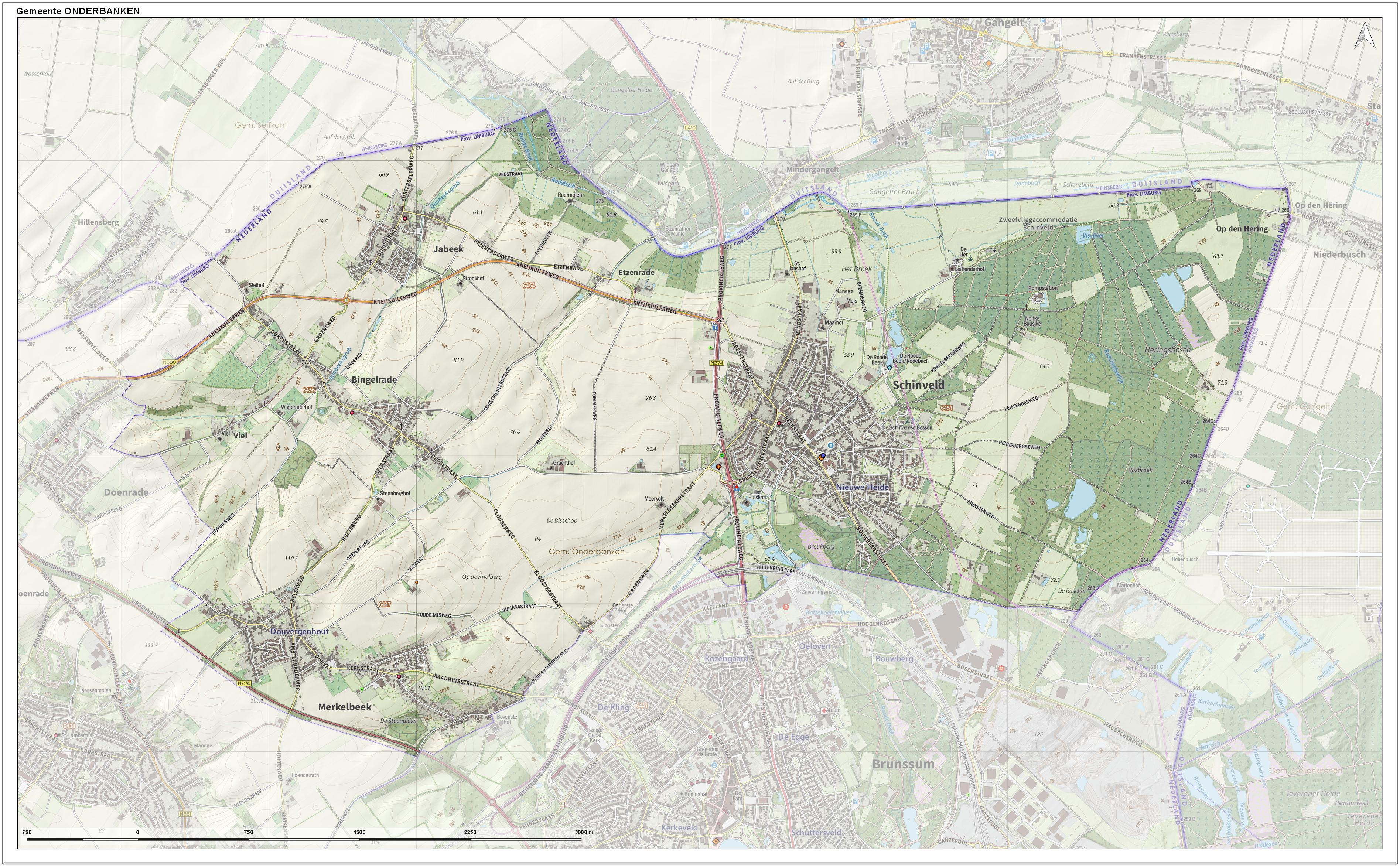 Topografische gemeentekaart. Resolutie: 400 pixels/km. Kaartbeeld samengesteld uit de open geodata van de Top10NL en Top25namen (Kadaster), Creative Commons-BY licentie. Gebouwvlakken uit open geodata BAG extract. Wegen uit de OpenStreetMap, OpenStreetMap community. Reliëfschaduw uit de Actuele Hoogtekaart AHN2. Samenstelling en kleurenschema: Jan-Willem van Aalst, met QGIS. Zie ook de Legenda.